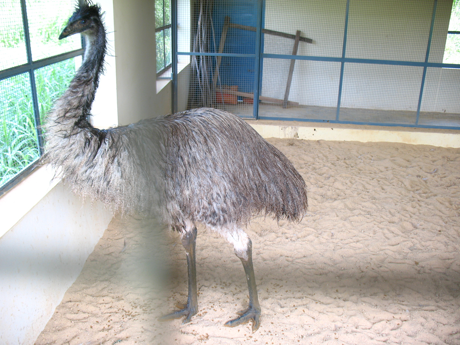 എമു